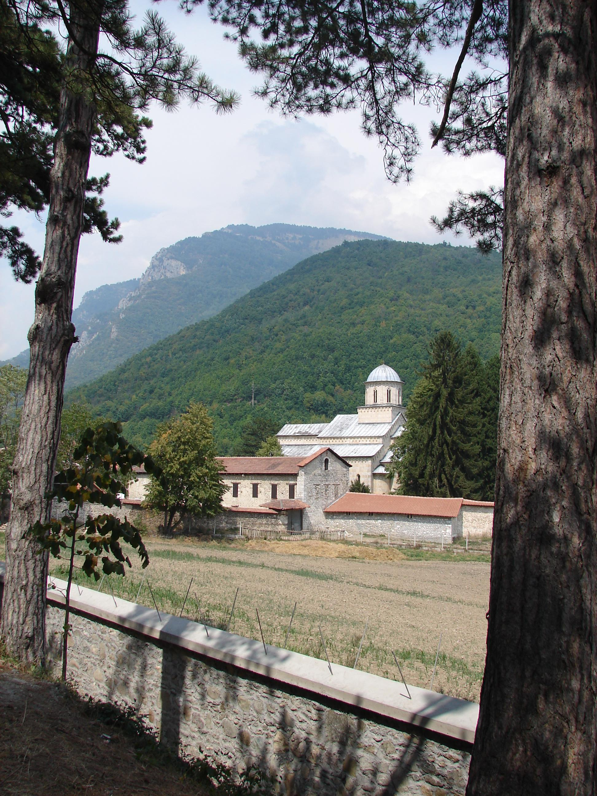 Visoki Dečani monastery.